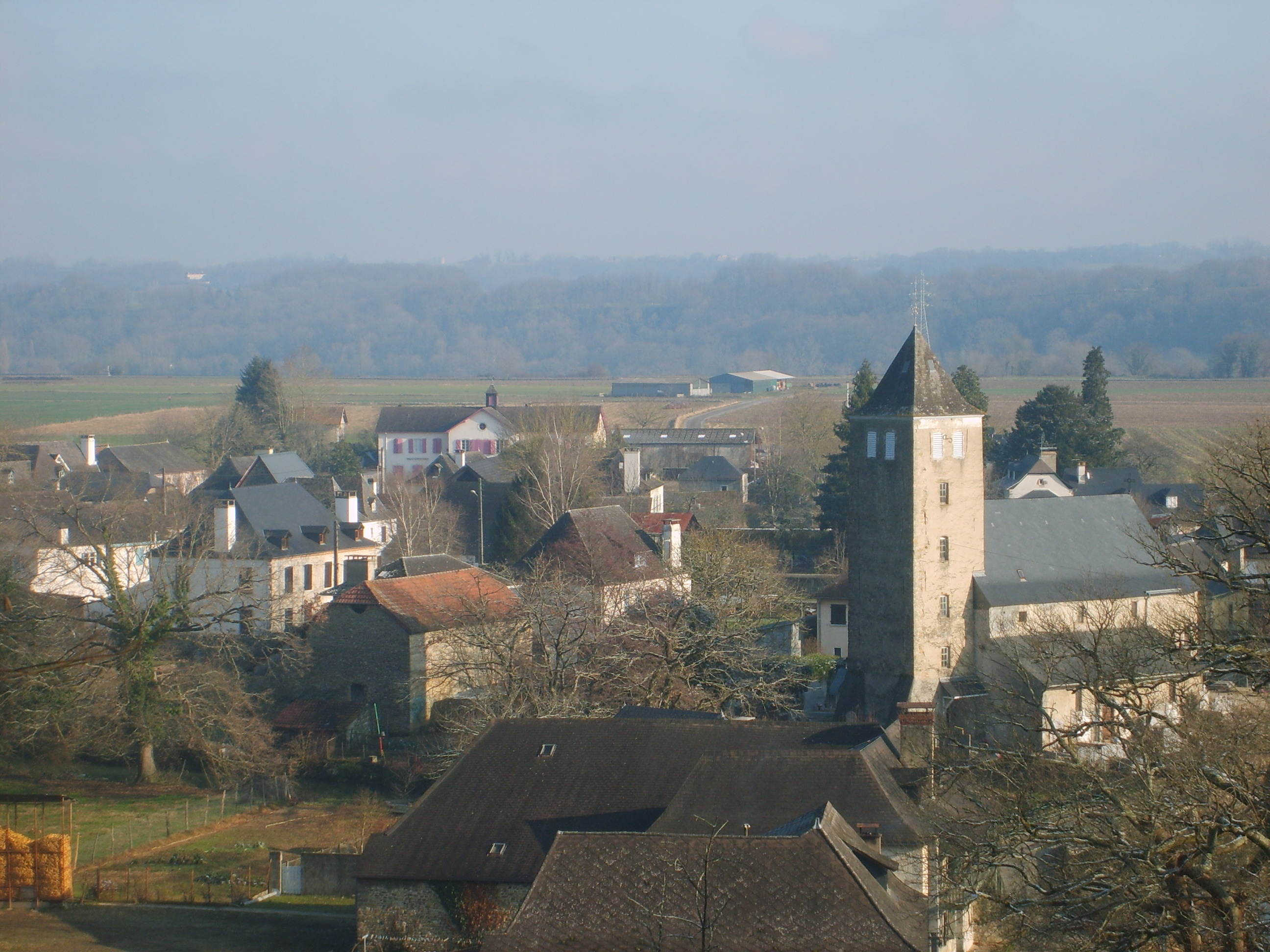 Village de Géronce vu depuis le Castéra.jpg